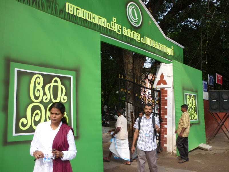 കേരളത്തിന്റെ വികസനത്തിന് സമഗ്രമായ രൂപരേഖയുണ്ടാക്കുവാൻ കേരളത്തെക്കുറിച്ച് സങ്കേതിക വിദഗ്ധരും, അക്കാദമിക്ക് വൈദഗ്ധ്യമുള്ളവരും, രാഷ്ട്രീയക്കാരും, സാധാരണ ജനങ്ങളും ഒത്തു ചേർന്ന് നടത്തുന്ന പഠന സമ്മേളനമാണ് അന്താരാഷ്ട്ര കേരള പഠന കോൺഗ്രസ്സ്.